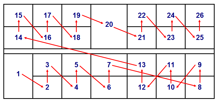 by use sailko